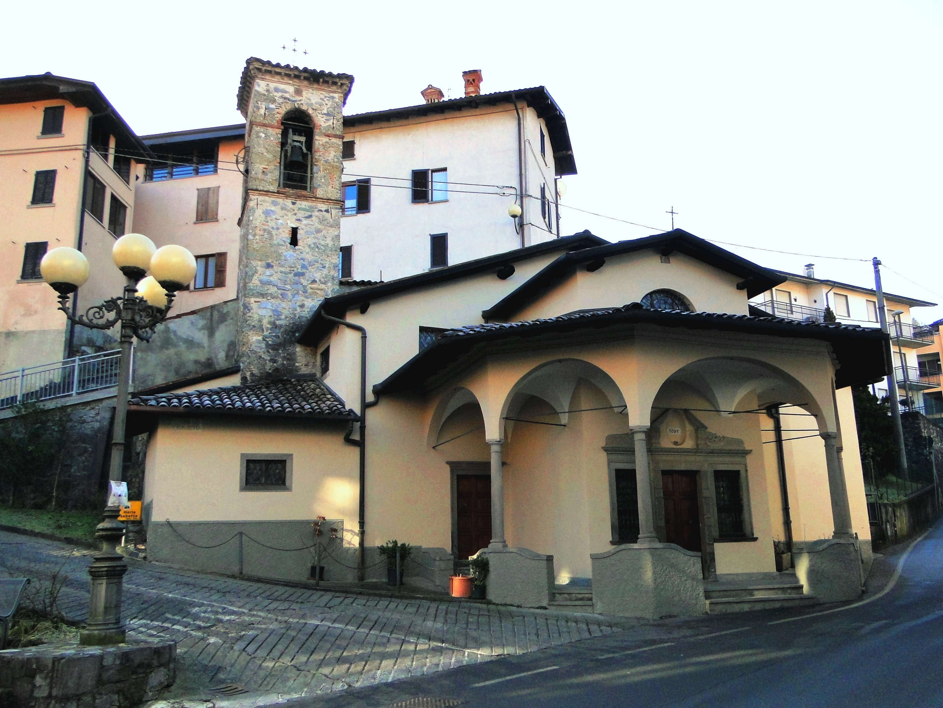 Chiesa di sant'Elisabetta. Leffe (BG). Italy